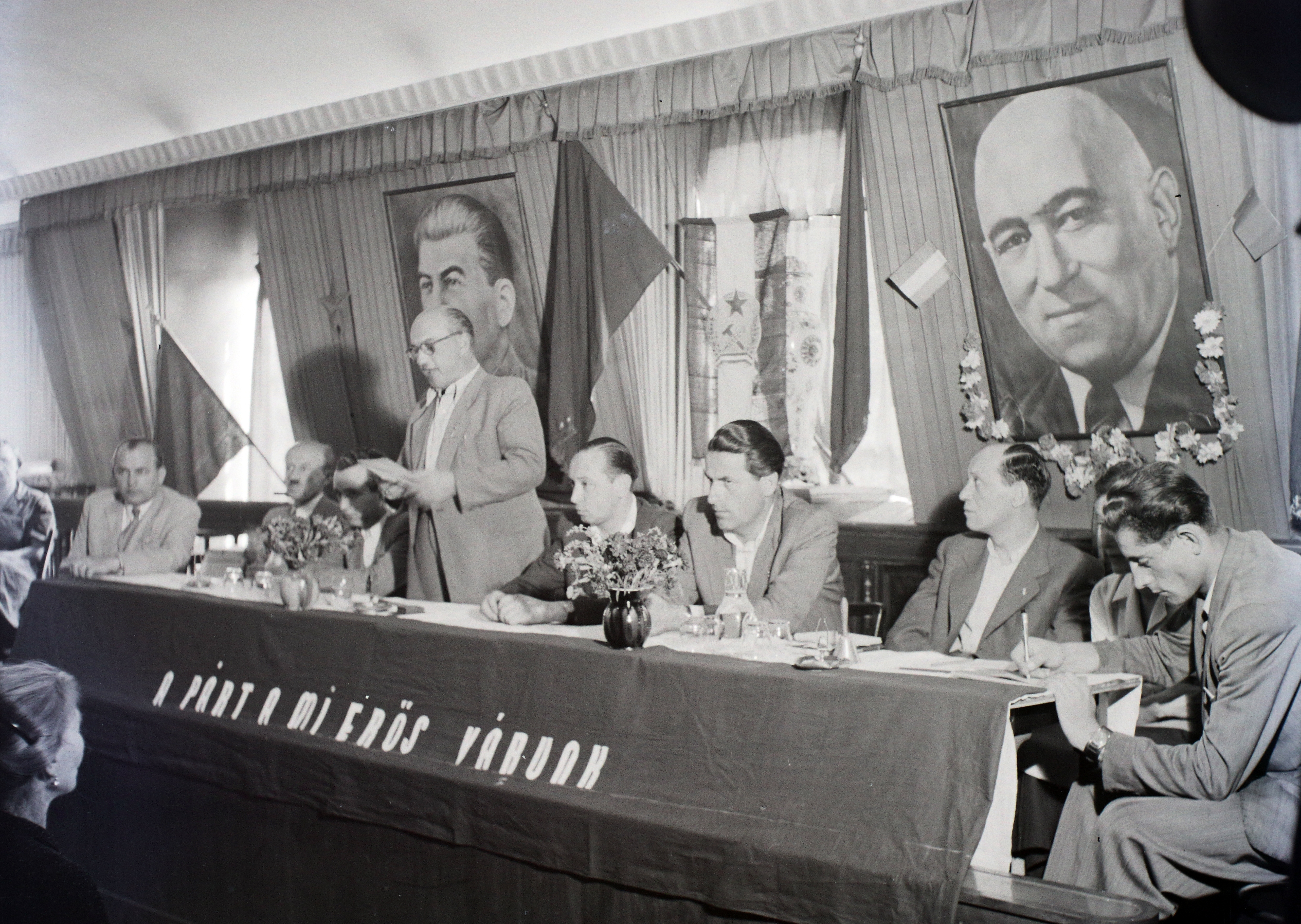 Budapest, pártgyűlés? Sztálin portré, Rákosi Mátyás, A párt a mi várunk politikai dekoráció